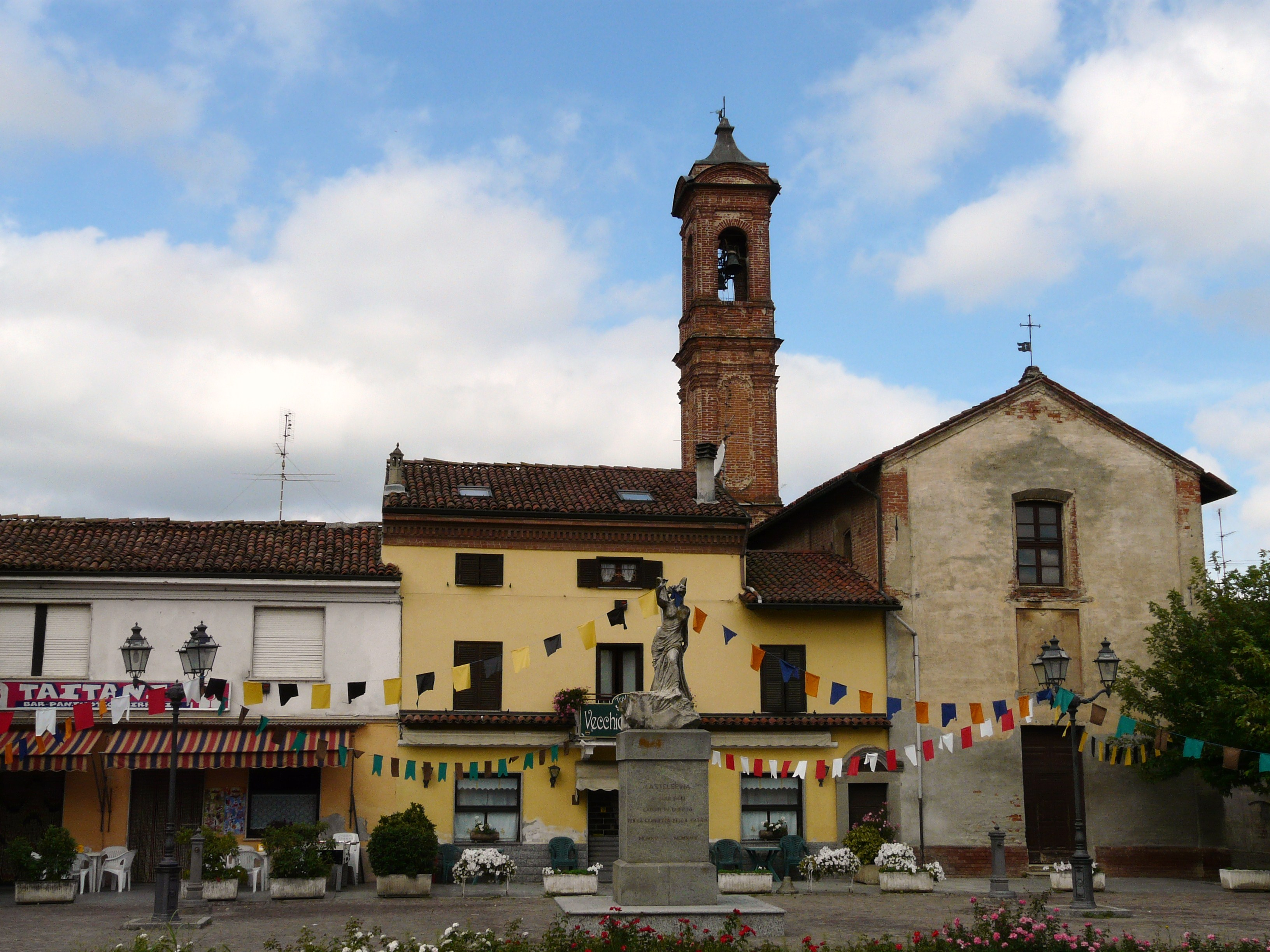 Piazza principale di Castelspina, Piemonte, Italia